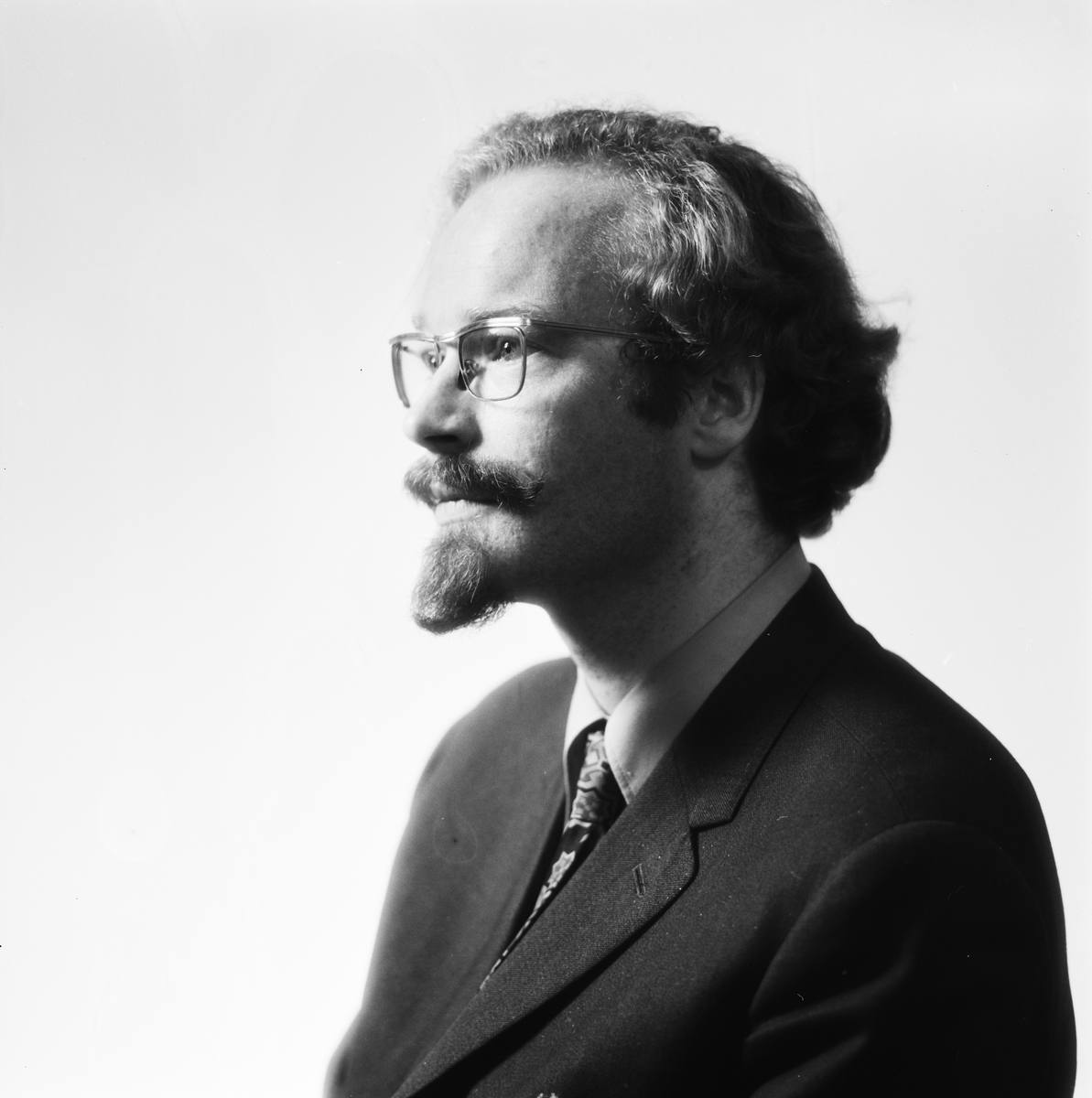 Knut Ødegård (født 6. november 1945 i Molde) er en norsk forfatter. Foto: Leif Ørnelund